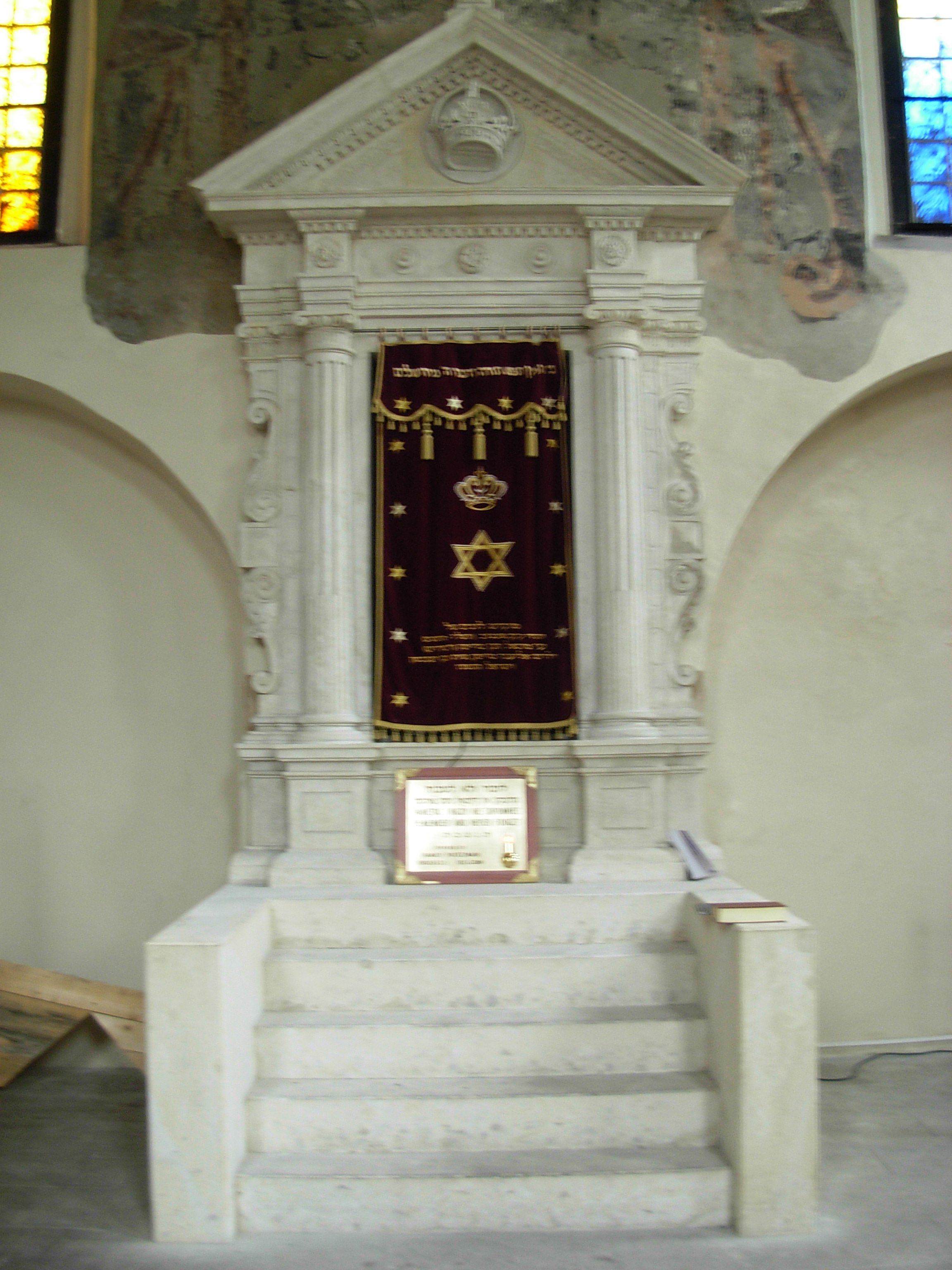 Old Synagogue in Pińczów